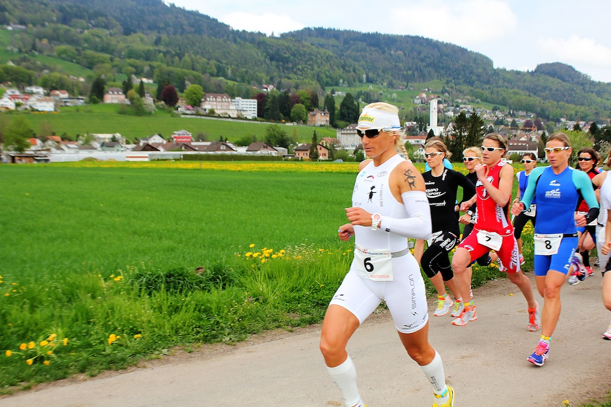 Yvonne van Vlerken beim Rheintal Duathlon 2013; vor Martina Krähenbühl (7) und Jacqueline Uebelhart (8)